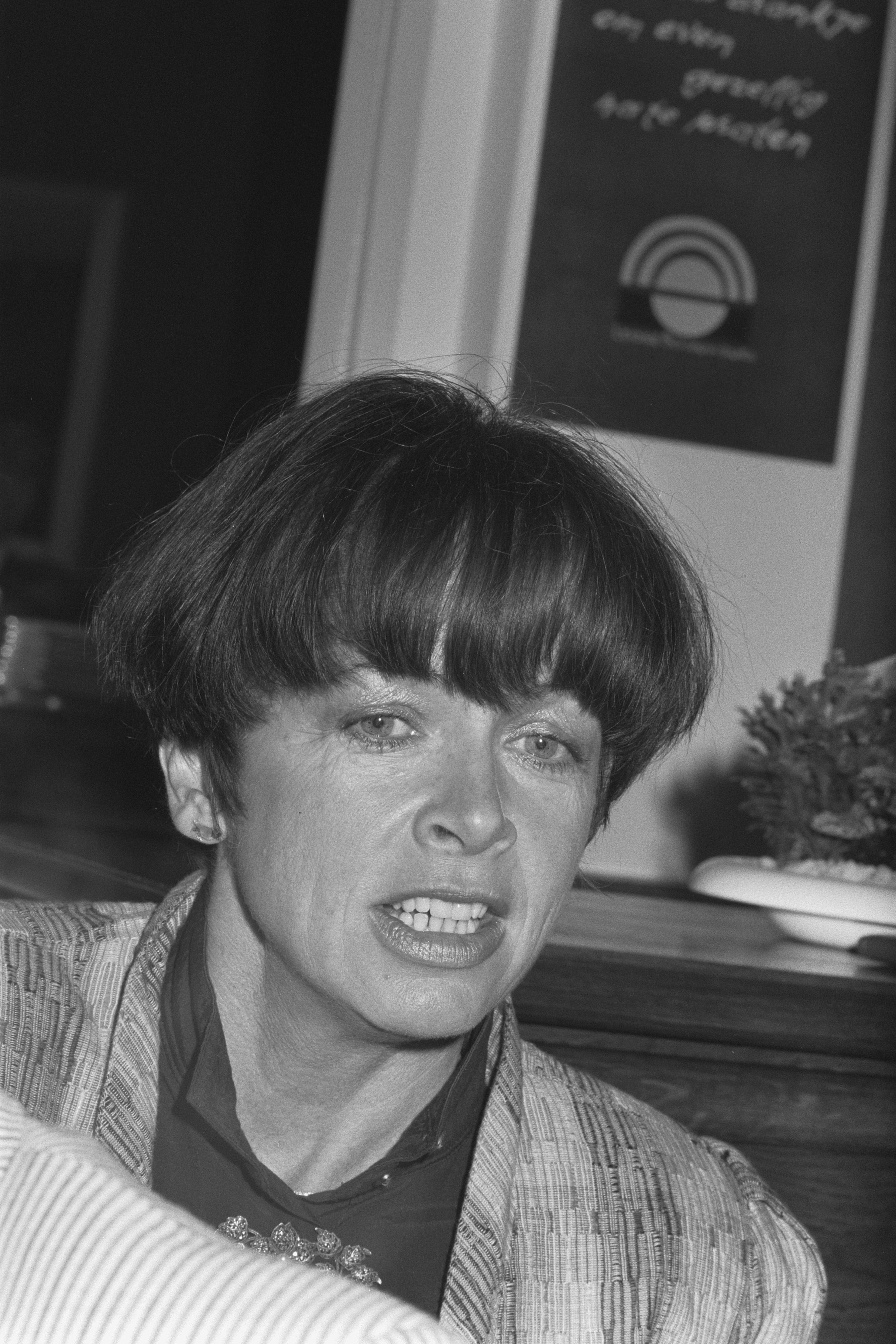 Collectie / Archief : Fotocollectie Anefo Reportage / Serie : [ onbekend ] Beschrijving : Sonja Barend Datum : 20 oktober 1987 Trefwoorden : portretten Persoonsnaam : Barend, Sonja Fotograaf : Bogaerts, Rob / Anefo Auteursrechthebbende : Nationaal Archief Materiaalsoort : Negatief (zwart/wit) Nummer archiefinventaris : bekijk toegang 2.24.01.05 Bestanddeelnummer : 934-1111